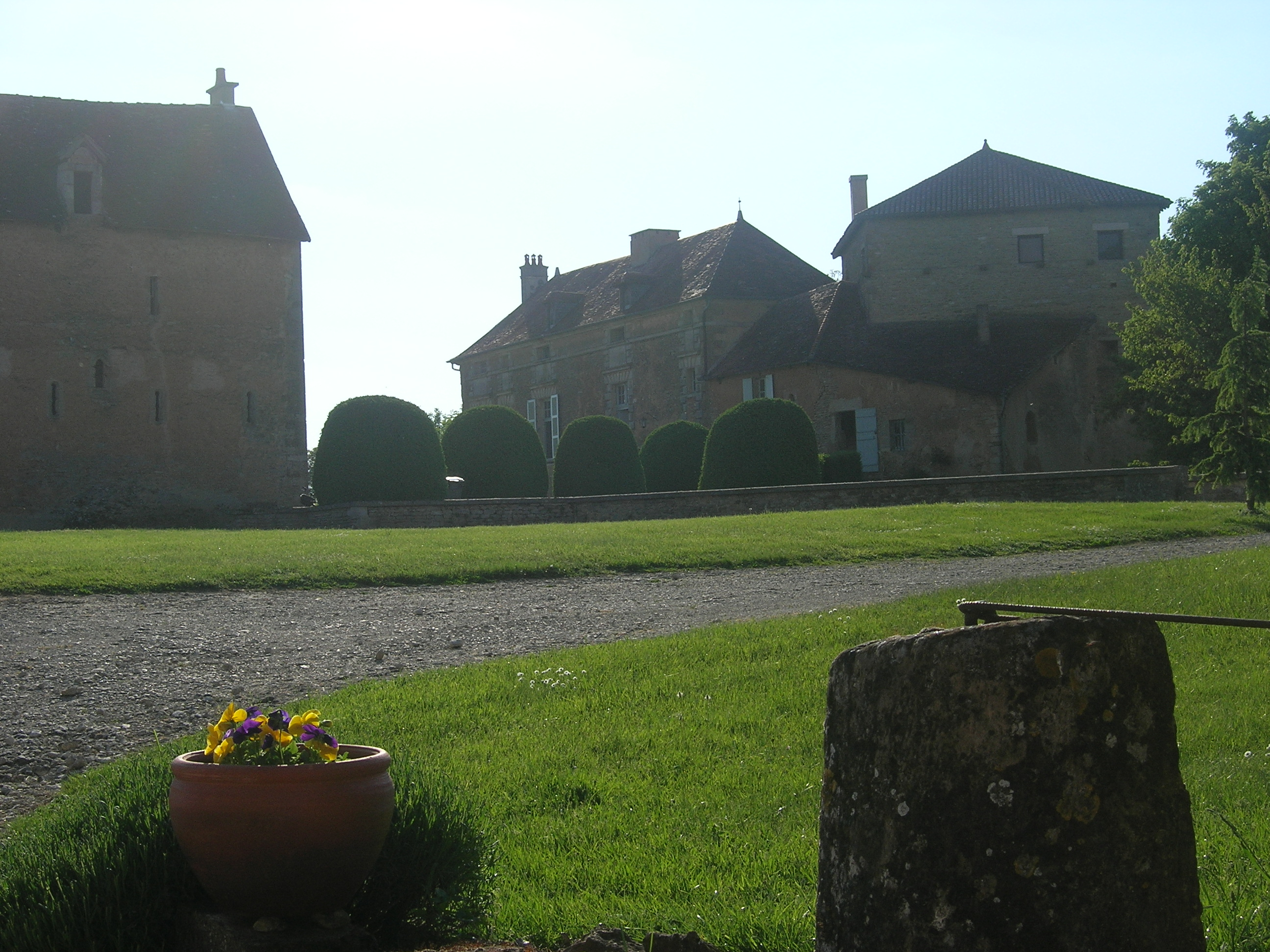 Chateau de Nully